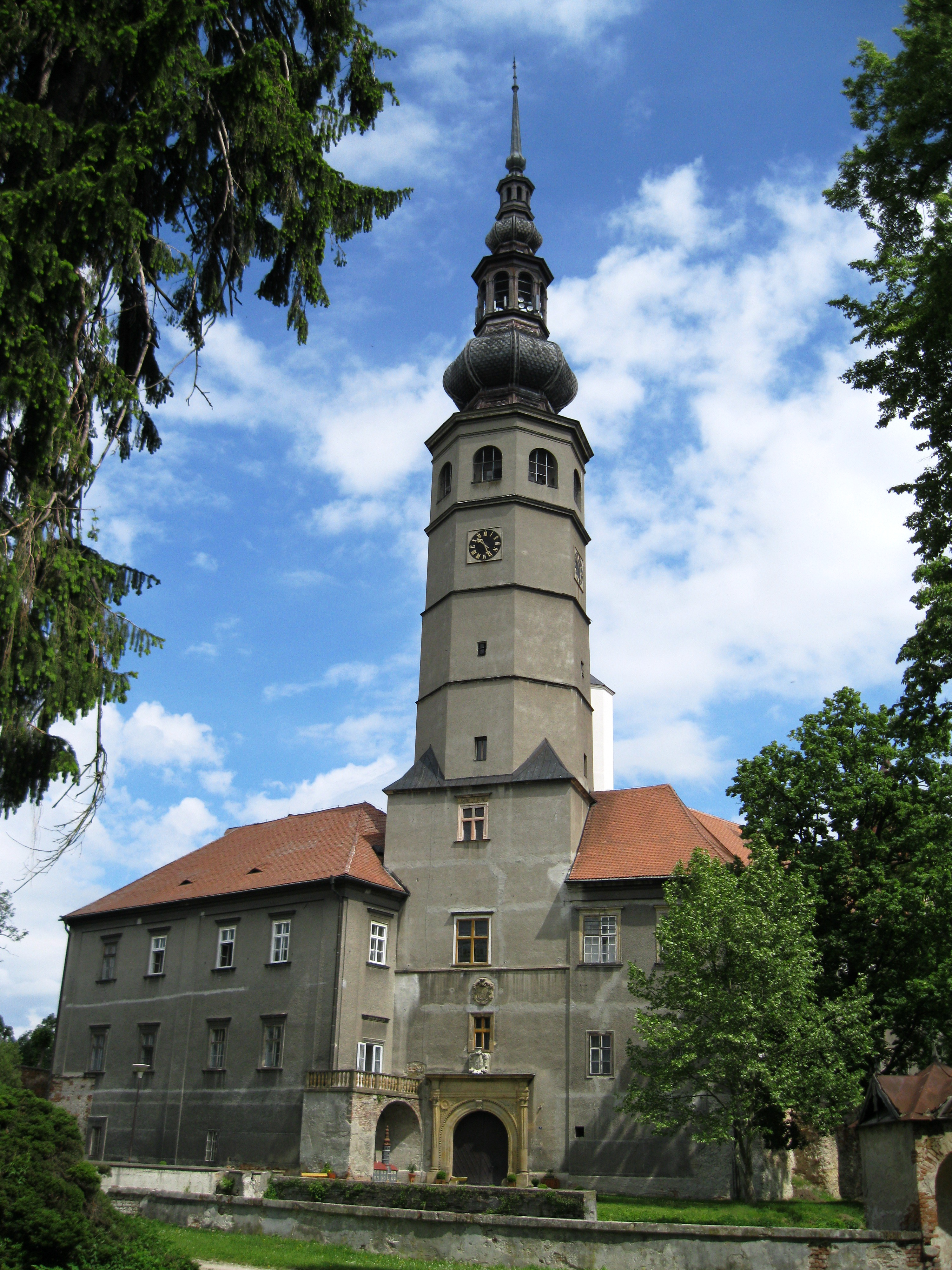 Zámek Tovačov, Tovačov 1